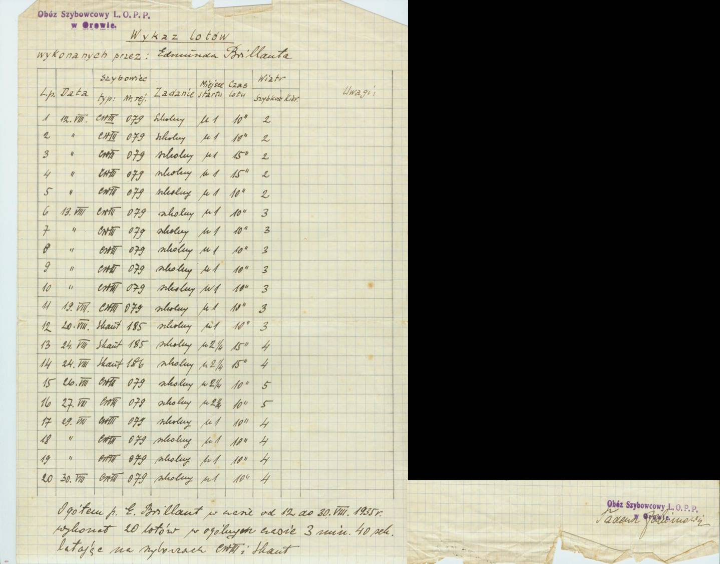 wykaz lotów w ramach kursu Edmond Wilhelm Brillant